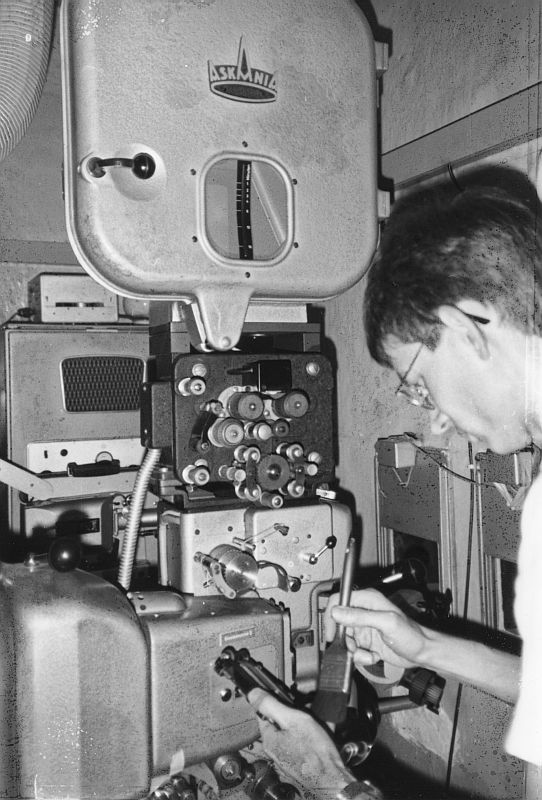 Filmprojektor "Askania AP XII", Baujahr 1955